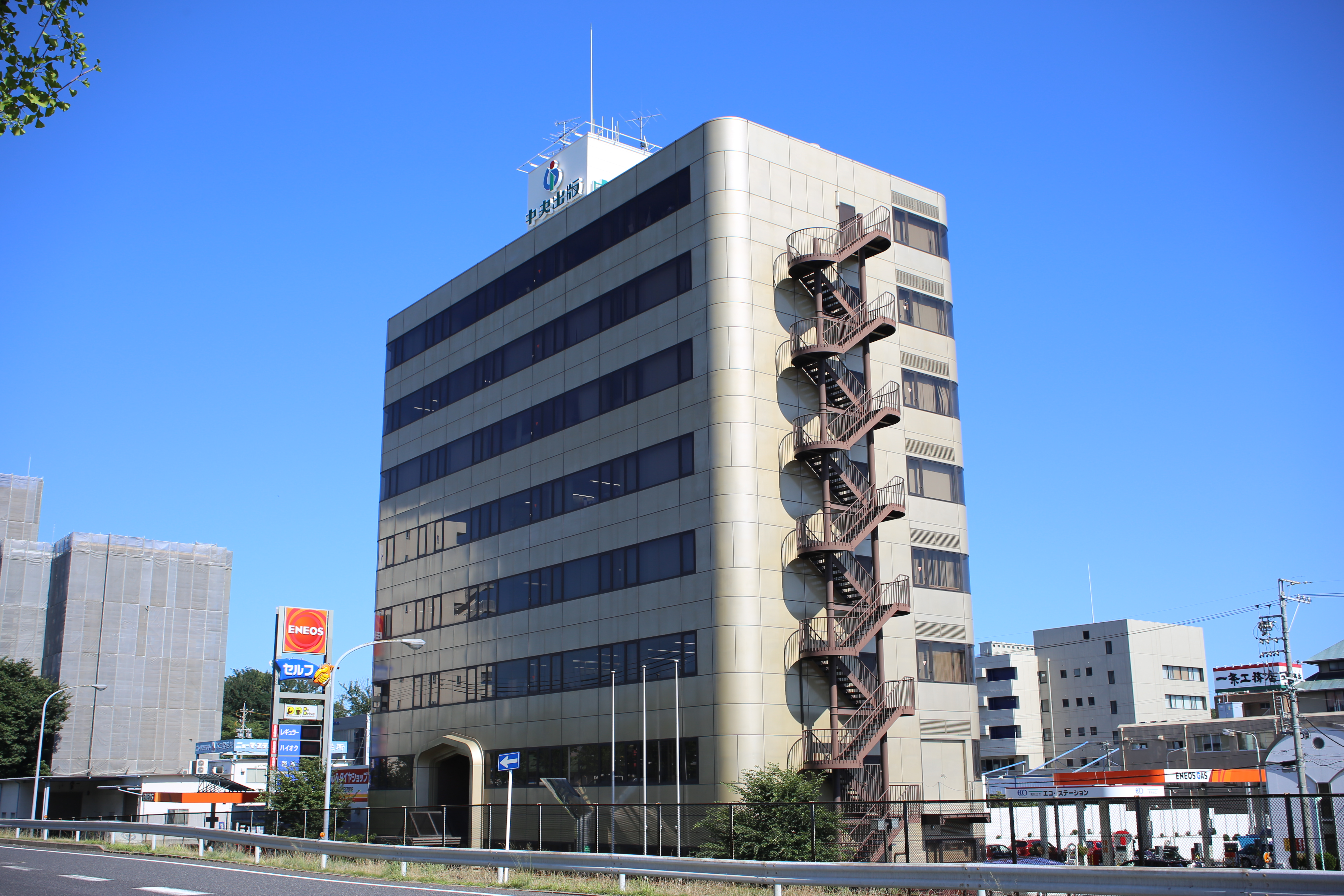 名古屋市名東区姫若町のKTCホールディングス本社を北側公道西側より撮影